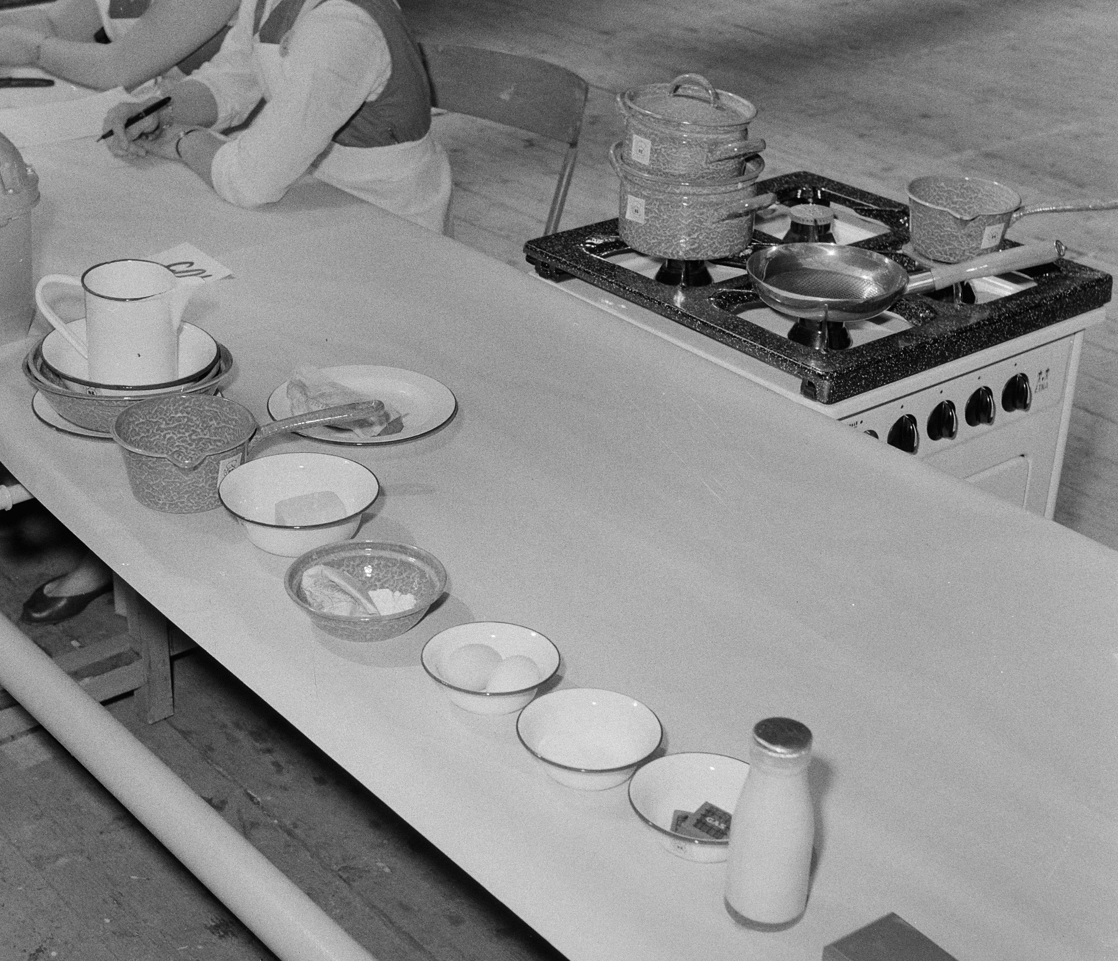 Collectie / Archief : Fotocollectie Anefo Reportage / Serie : [ onbekend ] Beschrijving : Kookwedstrijd BK emaille Datum : 21 mei 1957 Trefwoorden : koken, wedstrijden Fotograaf : Behrens, Herbert / Anefo Auteursrechthebbende : Nationaal Archief Materiaalsoort : Negatief (zwart/wit) Nummer archiefinventaris : bekijk toegang 2.24.01.03 Bestanddeelnummer : 908-6129